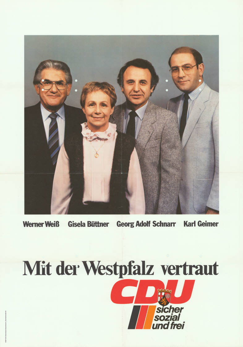 Werner Weiß, Gisela Büttner, Georg Adolf Schnarr, Karl Geimer Mit der Westpfalz vertraut CDU sicher sozial und frei Abbildung: Gruppenfoto Plakatart: Kandidaten-/Personenplakat mit Porträt Auftraggeber: KV Kaiserslautern Objekt-Signatur: 10-010 : 518 Bestand: Landtagswahlplakate Rheinland-Pfalz (10-010) GliederungBestand10-18: Landtagswahlplakate Rheinland-Pfalz (10-010) » CDU Lizenz: KAS/ACDP 10-010 : 518 CC-BY-SA 3.0 DE